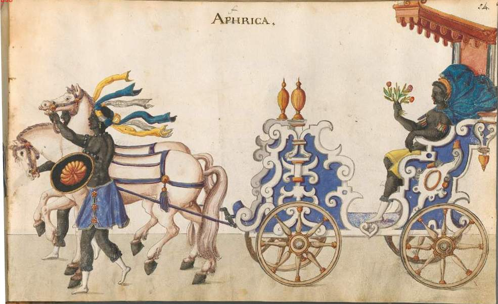 representacion simbólica del continente africano